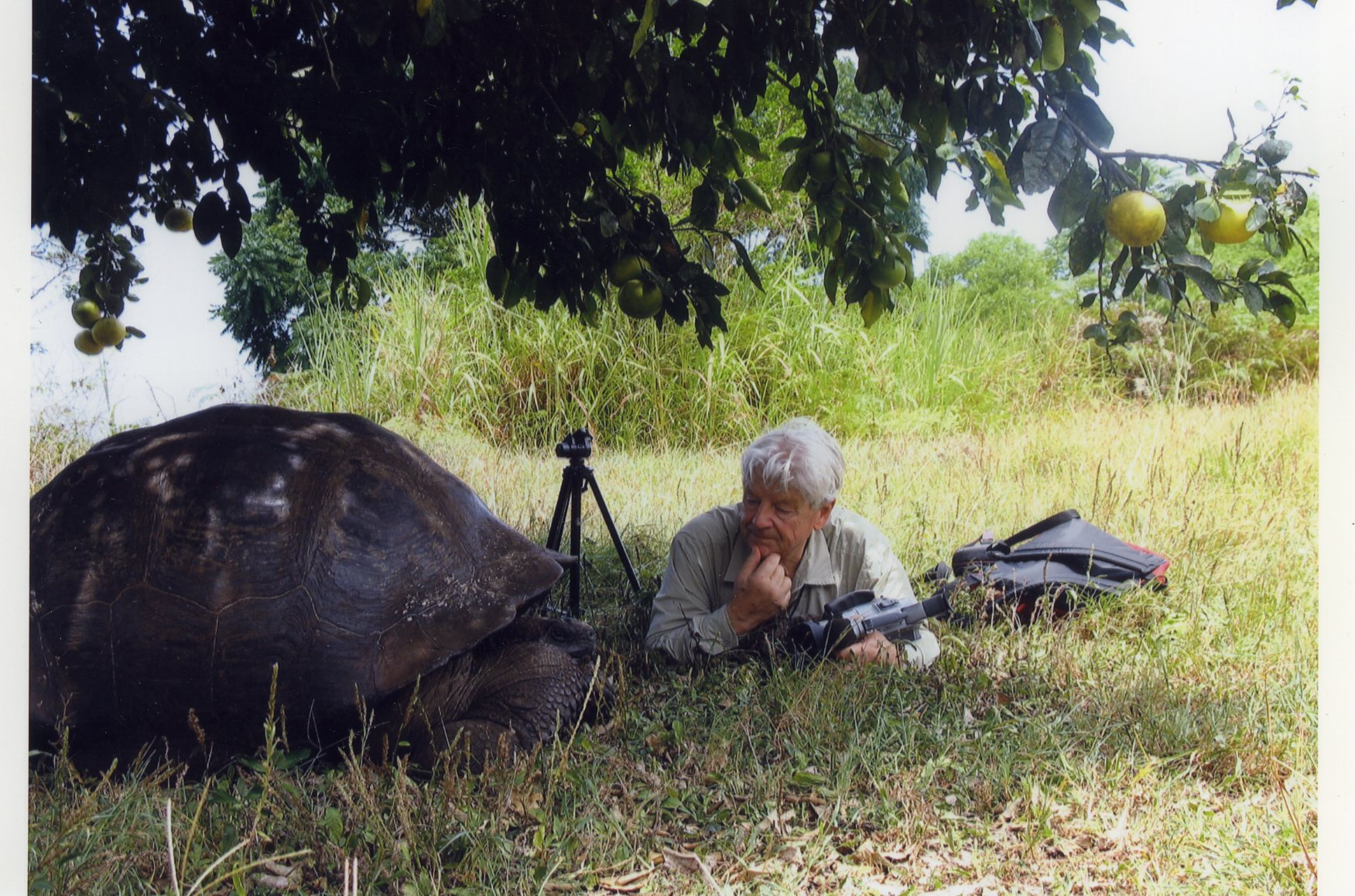 Der Verhaltensforscher Eibl-Eibesfeldt mit einer Galapagos Riesenschildkröte auf den Galapagos Inseln im Jahr 2006.